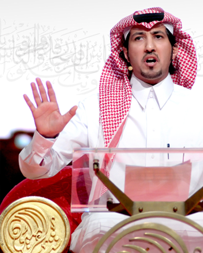 زياد بن حجاب بن نحيت aoh500